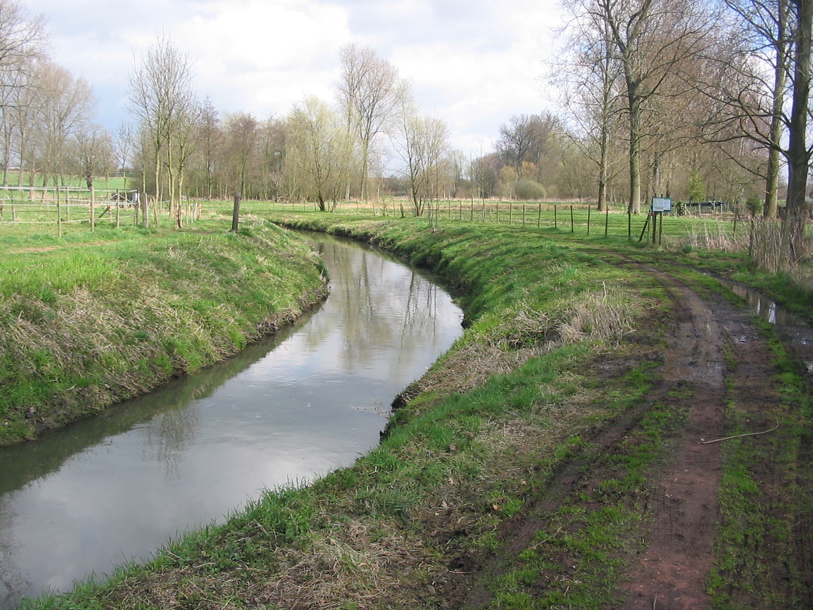 natuurgebied Oude Zuun Sint-Pieters-Leeuw zomer